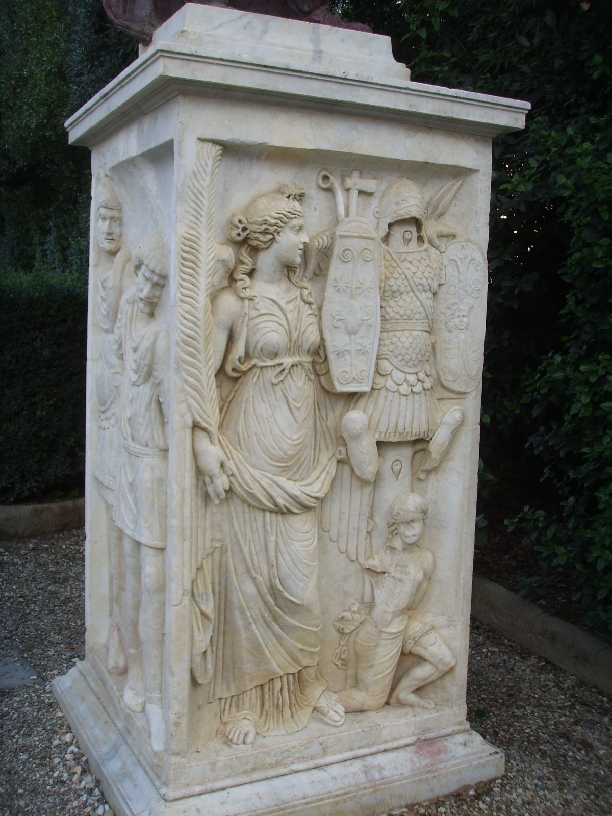 Boboli, prigionieri parti